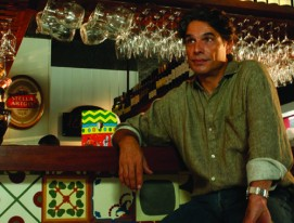 Cozinheiro francês Olivier Anquier em imagem do acervo da TV Brasil.